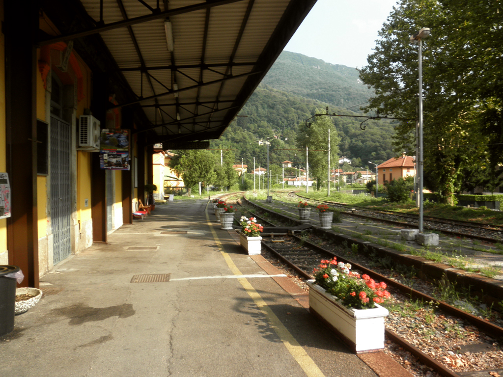 Stazione ferroviaria di Porto Ceresio, la banchina del binario 1.